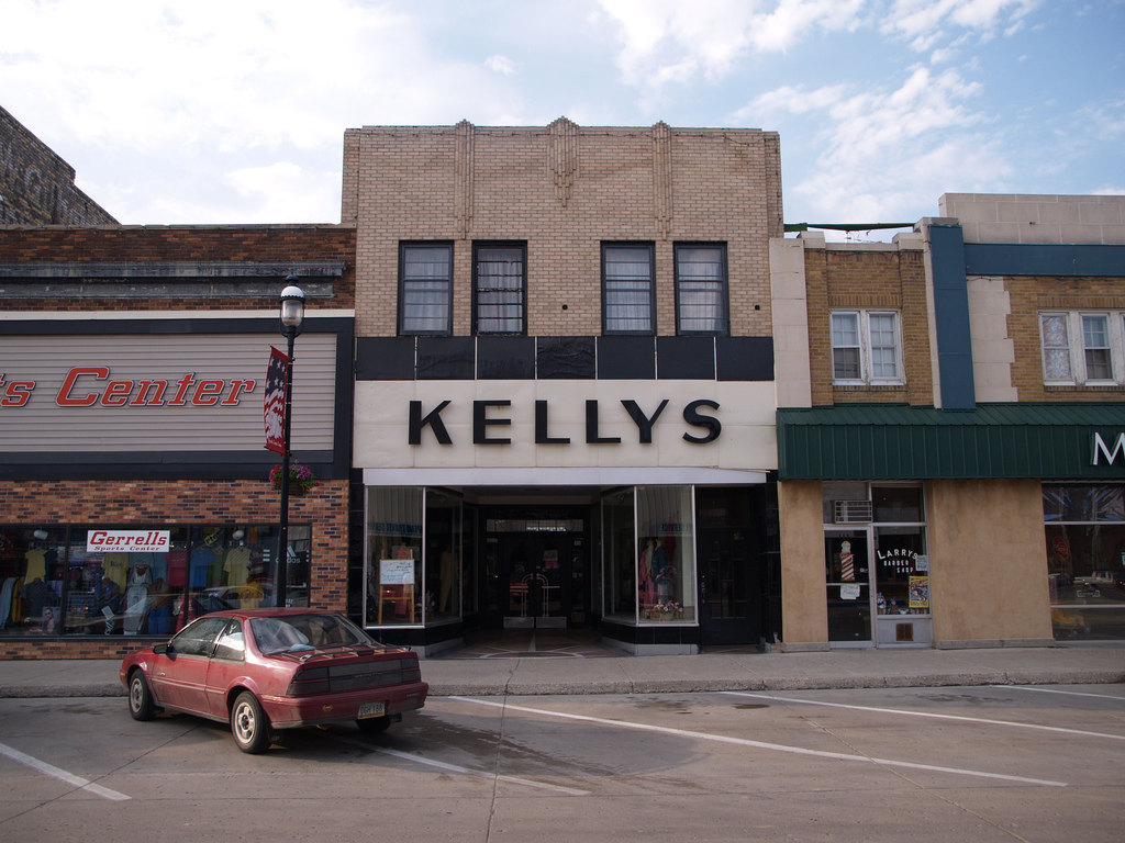 Devils Lake, North Dakota. From .